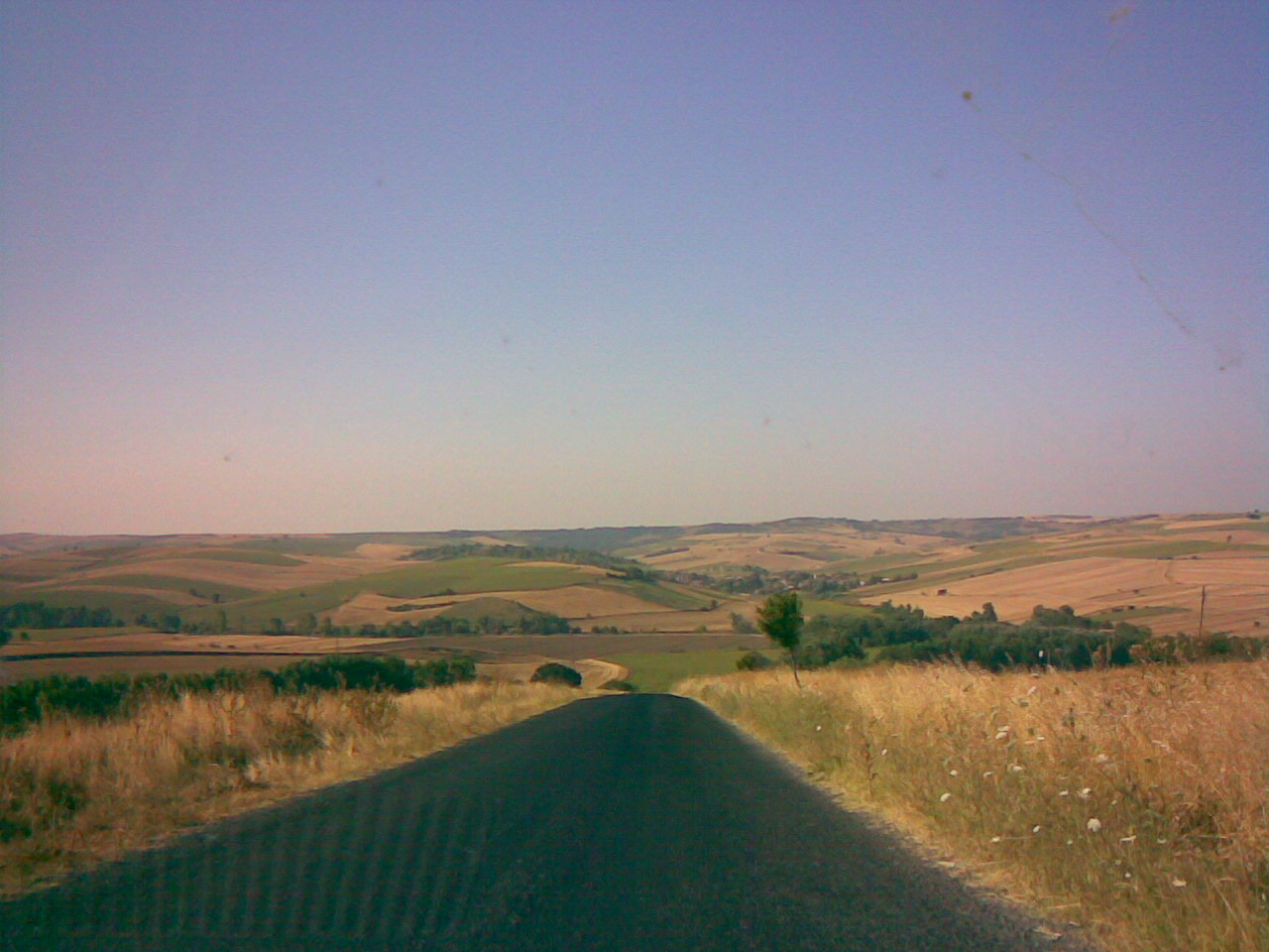 efecan poyraz